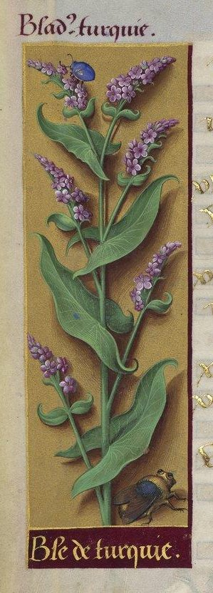 Représentation du « Ble de turquie », le sarrasin dans Les Grandes Heures d'Anne de Bretagne. Selon Jules Camus dans son article « Les noms des plantes du Livre d'Heures d'Anne de Bretagne » du Journal de Botanique, p. 335 : « Autant que je sache, nous avons ici la plus ancienne mention du sarrasin en France. »